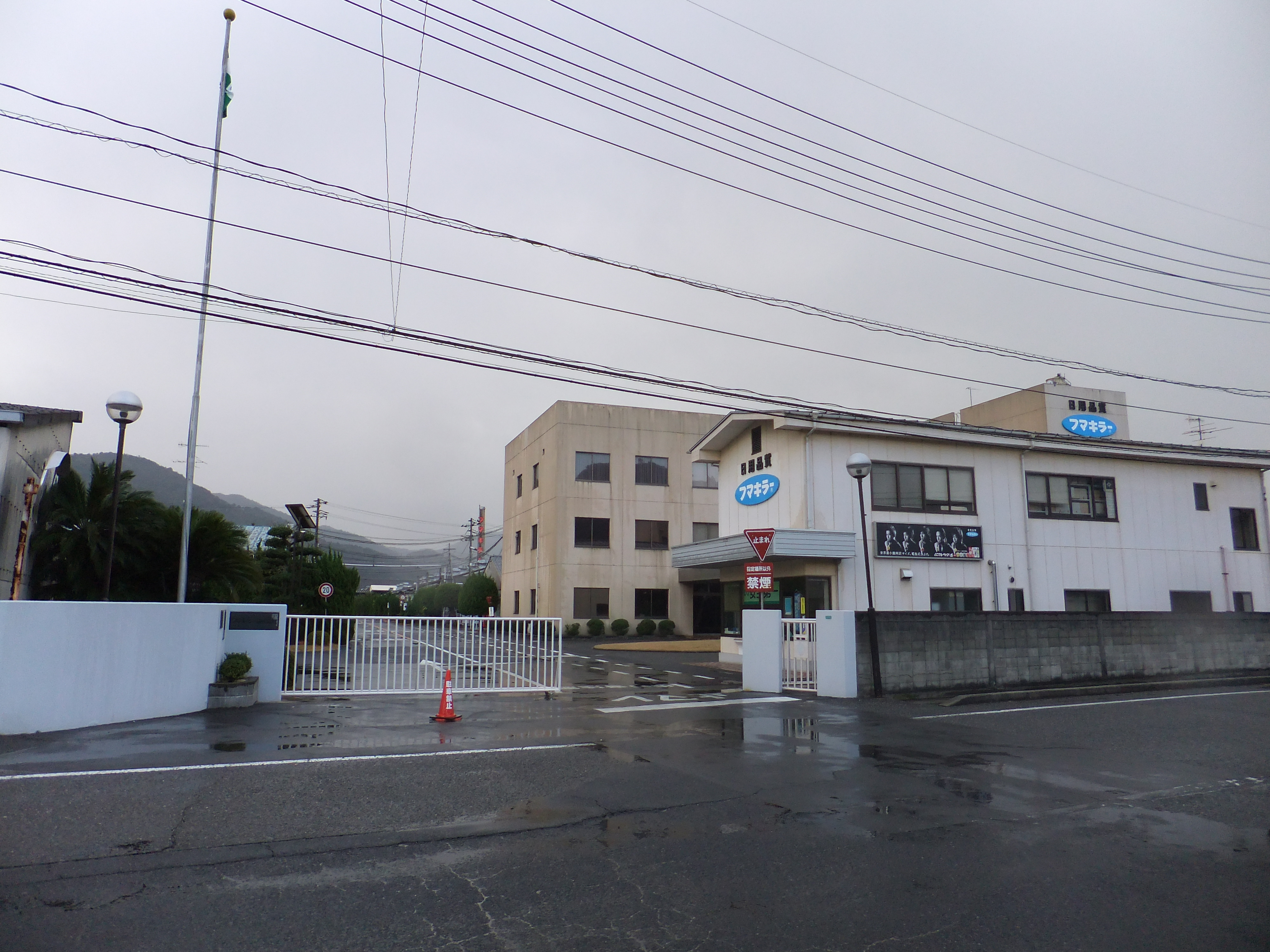 フマキラー 本店